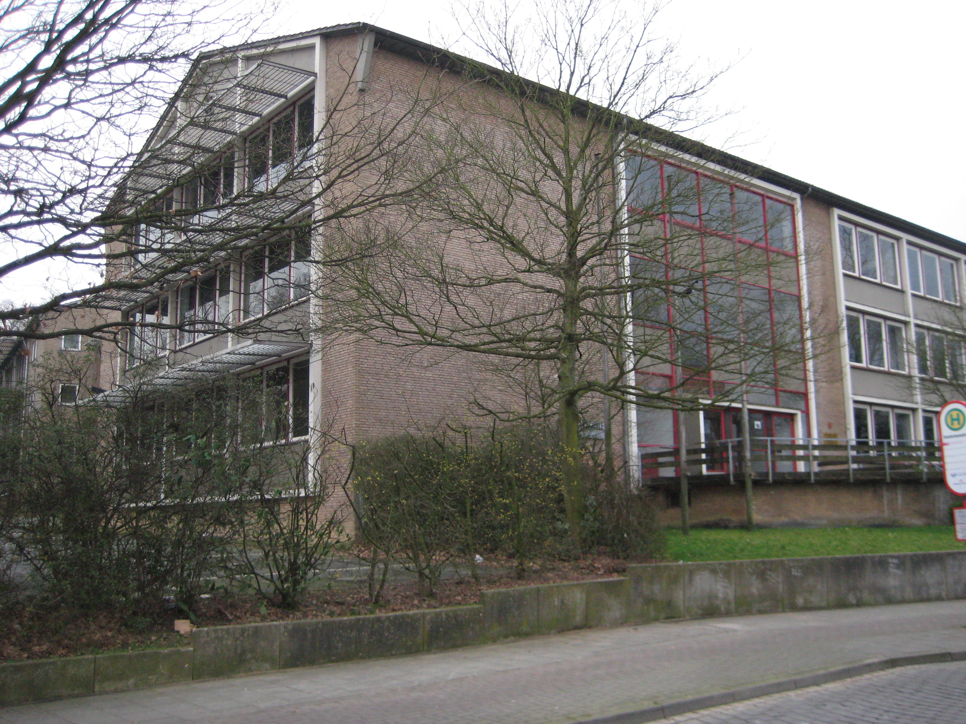 Ehemaliges Käthe-Kollwitz-Gymnasium, früherer - inzwischen verlegter - Eingang zur Ameldungstraße